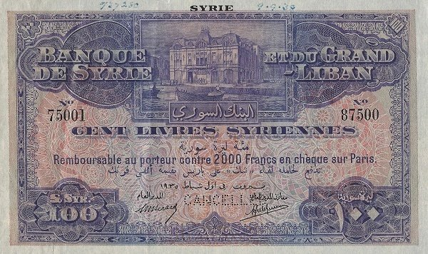 مئة ليرة سورية عام 1935 بدون علامة ضد التزوير